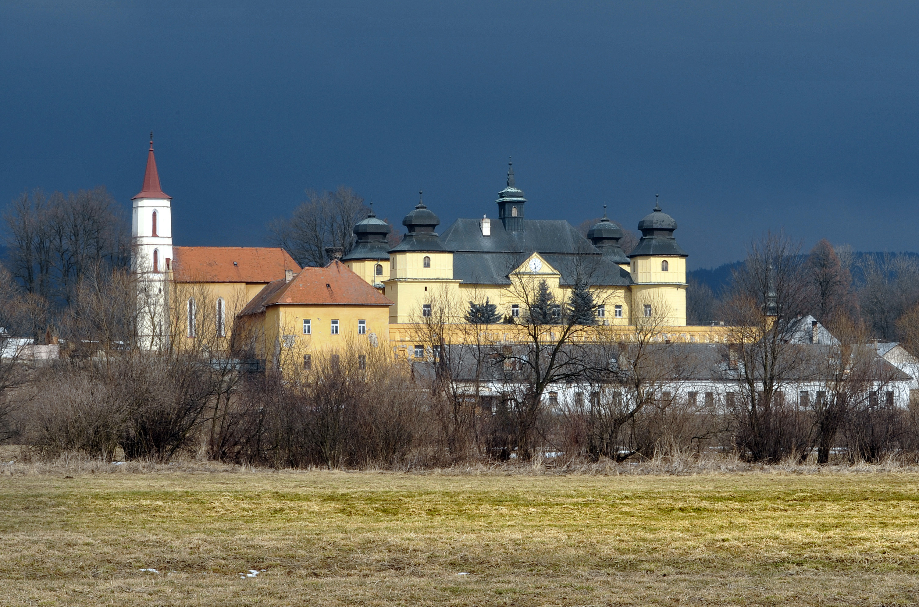 Kaštieľ